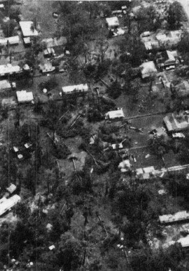 Fotografía Ariel del daño causado por el Huracán Alicia desde un helicóptero NOAA